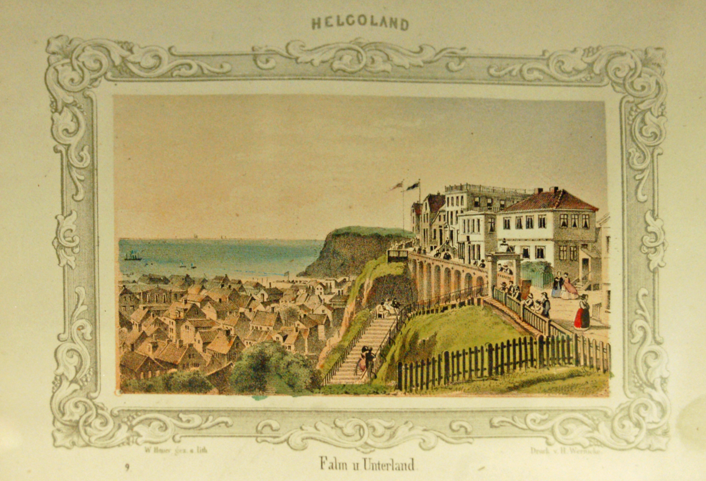 Briefbogen "Helgoland, Falm und Unterland" von Wilhelm Heuer (1813-1890)